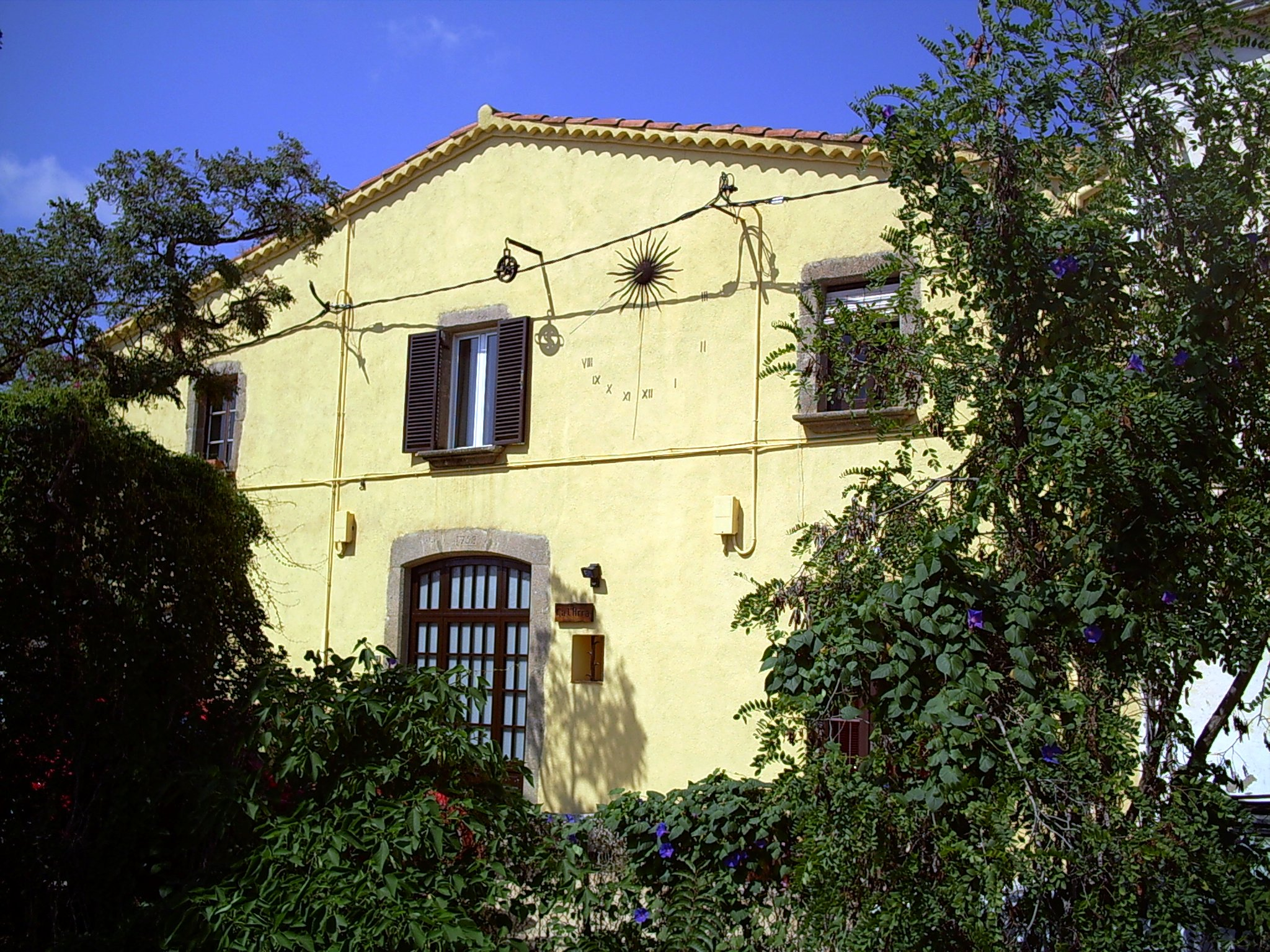 Museu Municipal de Ca l'Arrà, a Cabrils, el Maresme, (Catalunya).